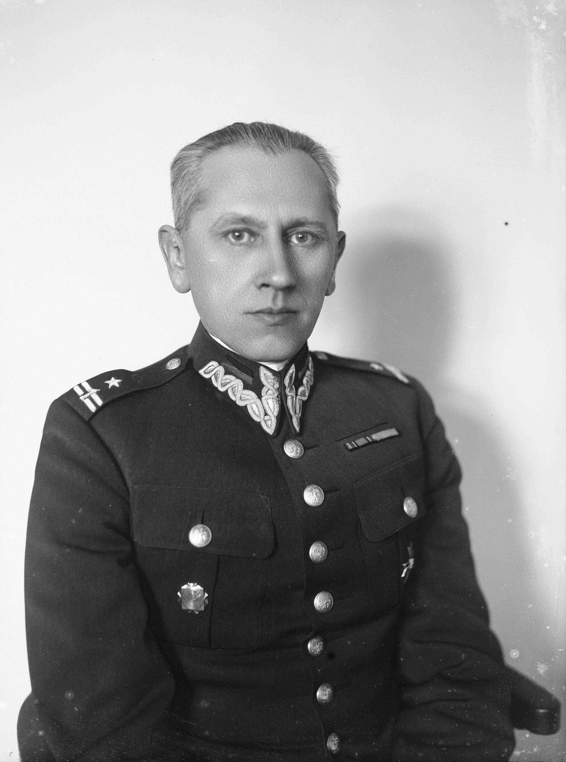 Portret (półpostać) - en face.